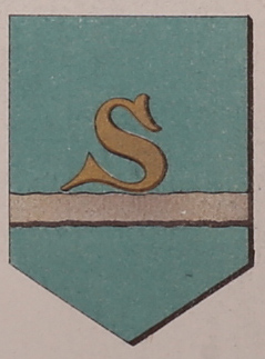 Skellefteå kommunvapen enligt Fredrik Liljeblad. Ur Svenska rikets jemte landskaps, städers och läns vapen. Till vägledning för arkitekter, målare, sten- och bildhuggare, gravörer, sockerbagare samt dekoratörer allmänhet. Samlade och utgifna af F. Liljeblad. 1878, Stockholm.